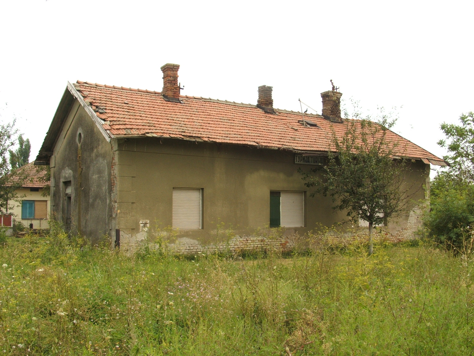 Turja egykori vasútállomása (vágányok felőli oldal). A vágányok fellelhetőek a gazban.